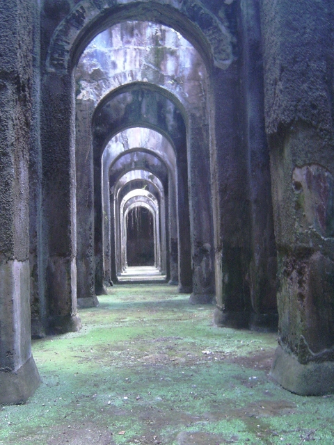 == Licenza d'uso: ==